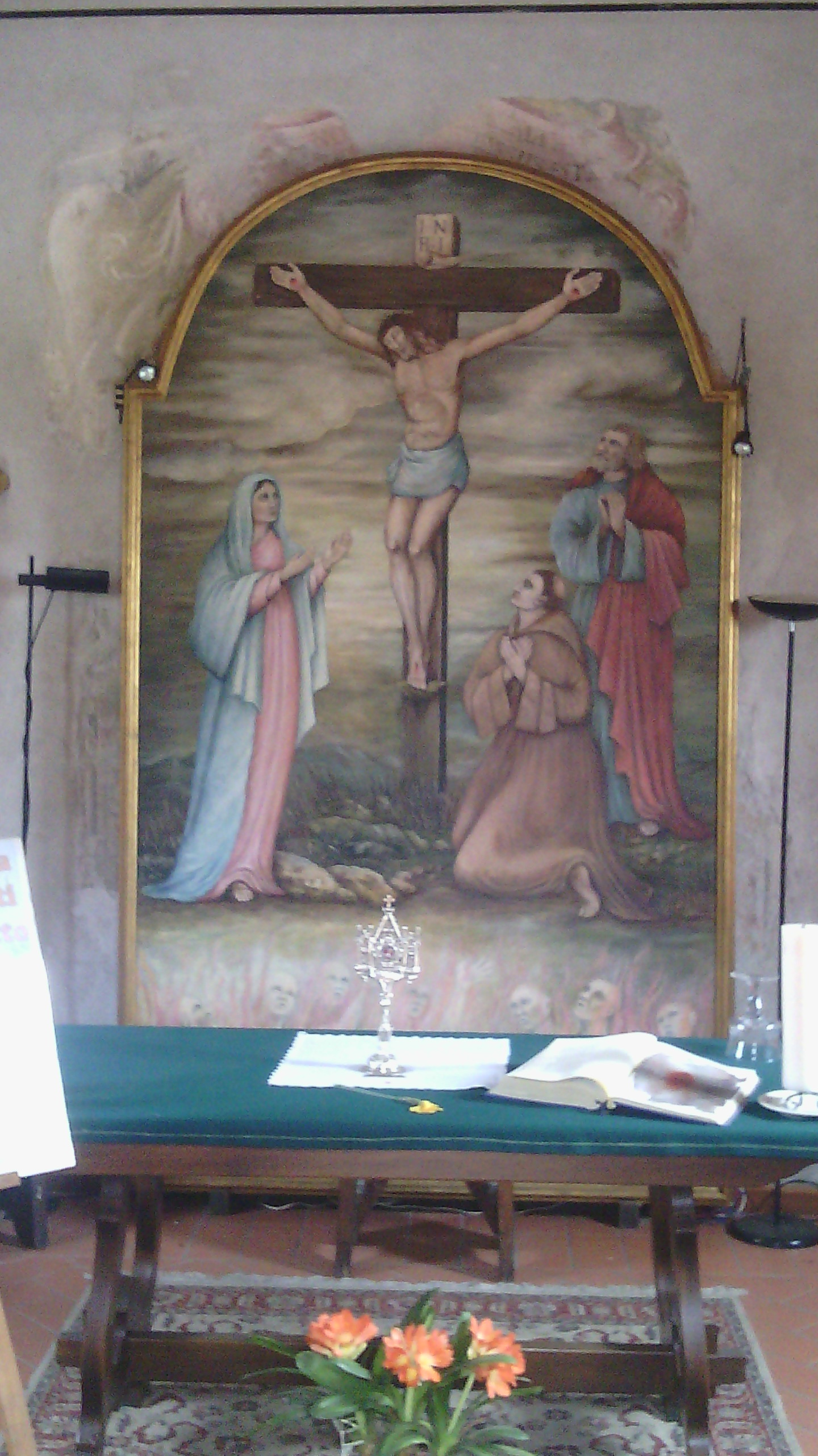 L'interno del lazzaretto di Vittuone (MI) - Italy